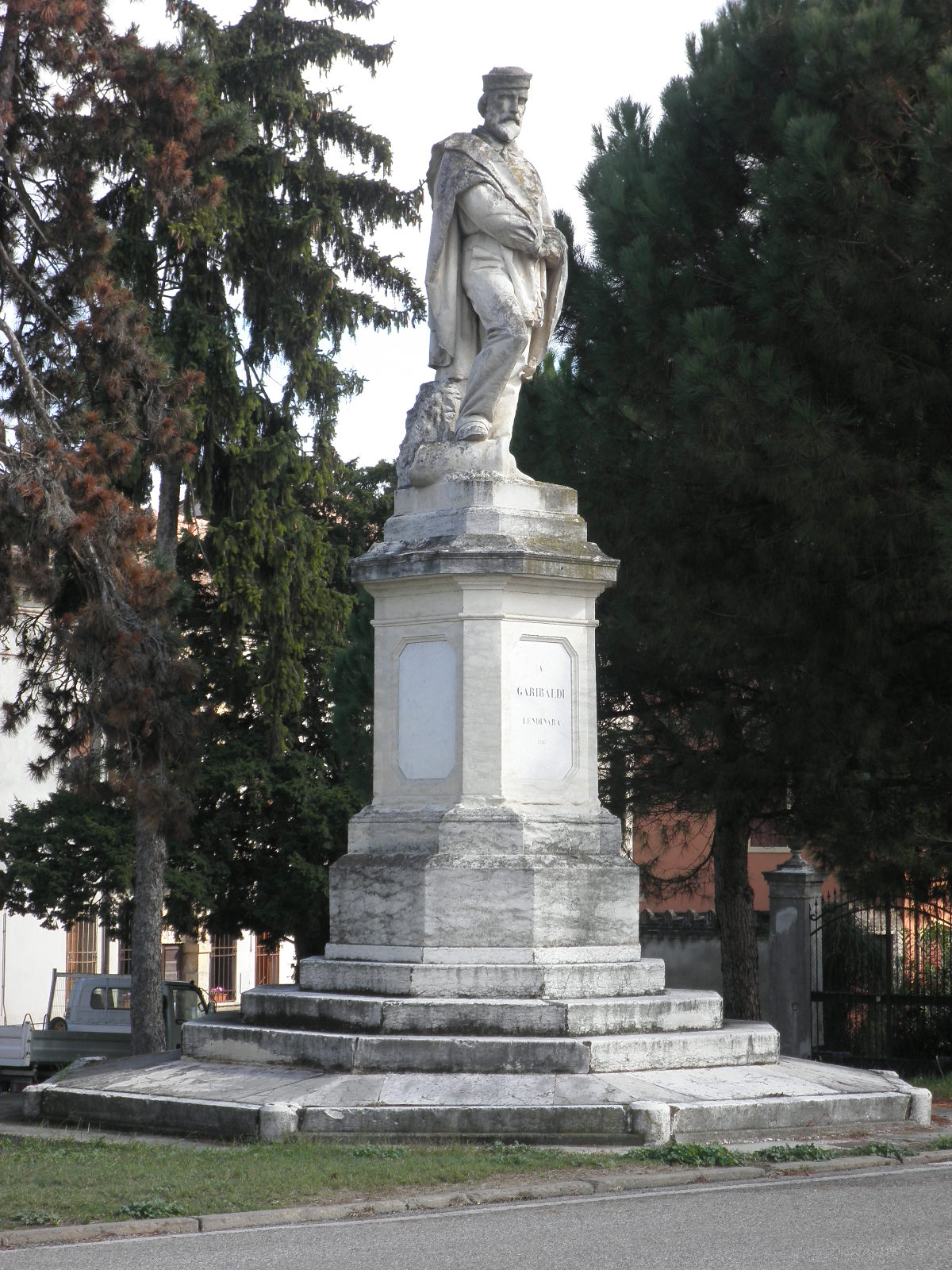 Monumento a Giuseppe Garibaldi a Lendinara (Rovigo).